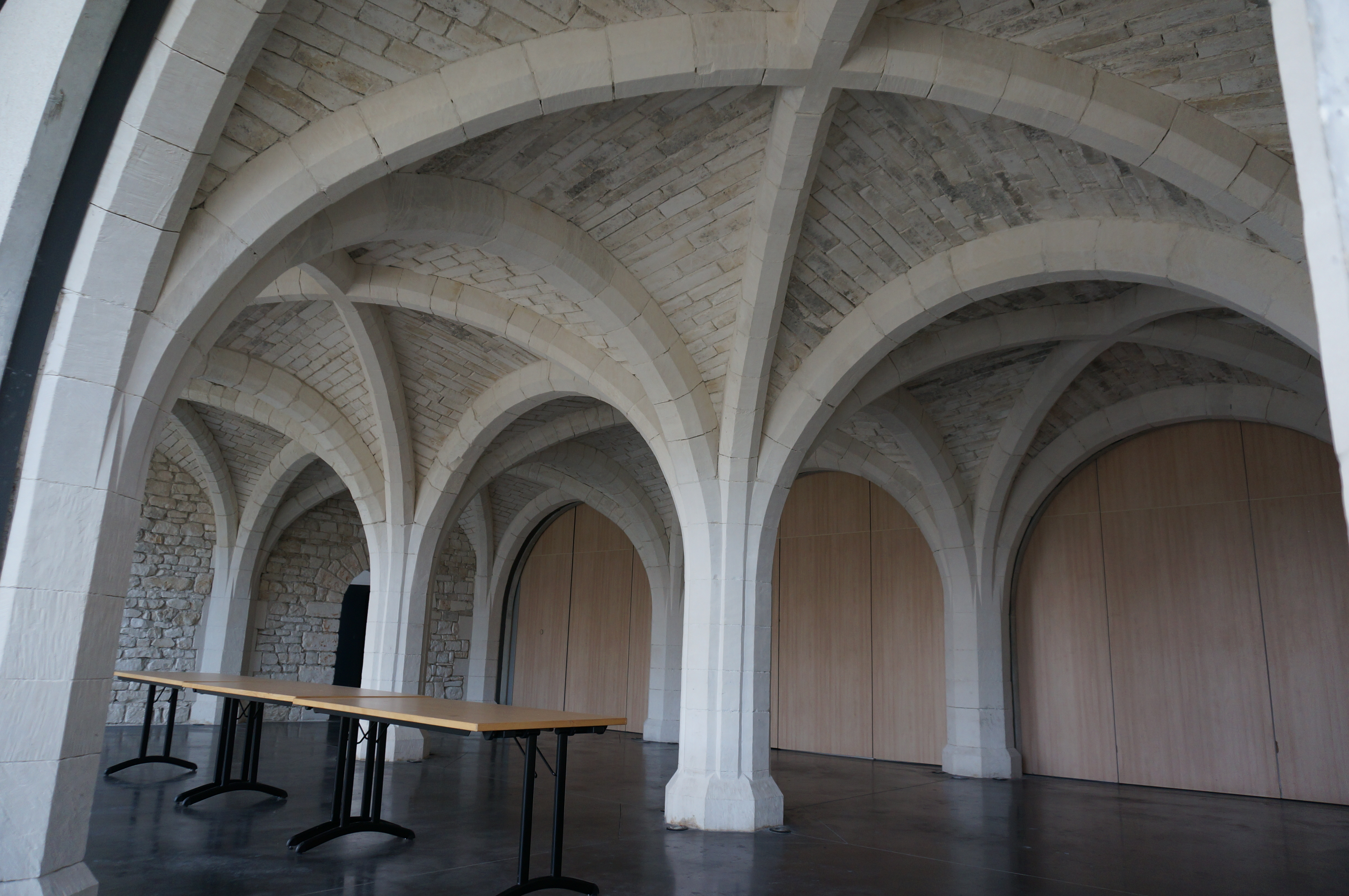 présenté lors d'une exposition en la Maison du patrimoine du Grand Troyes.